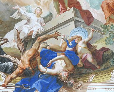 Benediktinerstift Neresheim, Fresko; Reproduktion gemeinfreier Darstellung